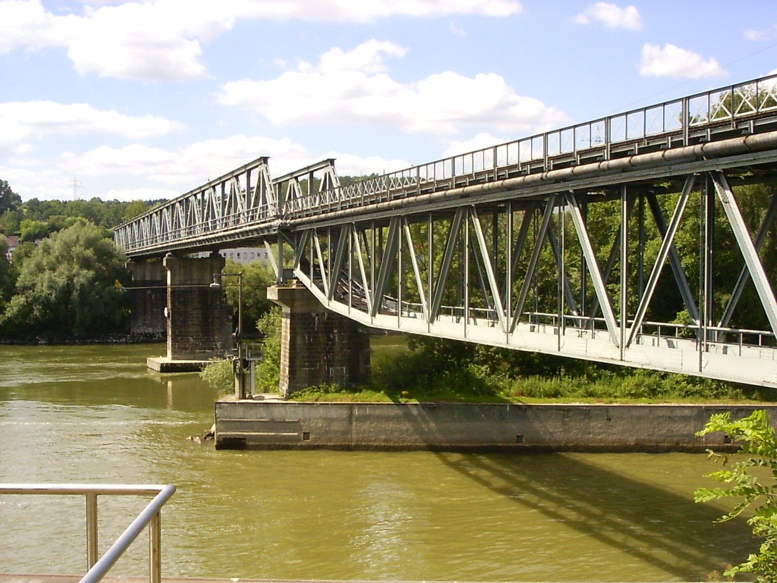 Eisenbahnbruecke Steinbachmühlbrücke Passau vom Nordufer der Donau